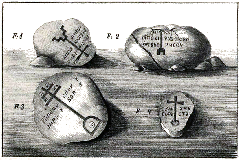 Двинские камни (по рисункам, помещённым во II т. журнала "Rubon" за 1842 г.)